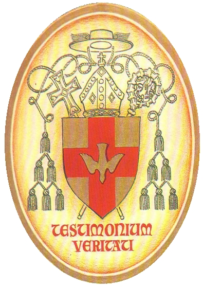 Wappen Bischof Wilhelm Kempf (1906-1982) Bischof von Limburg 1949-1982